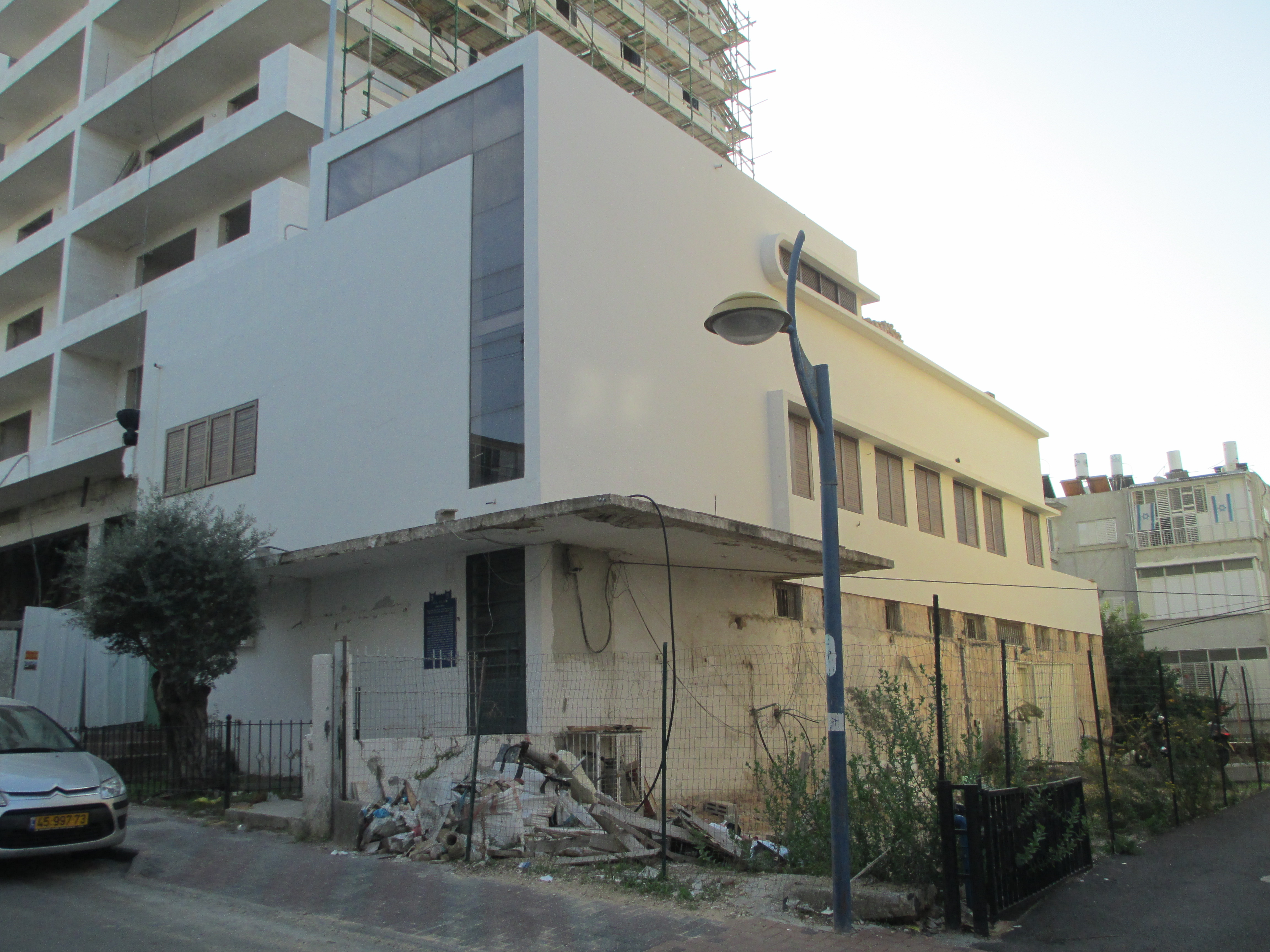 בית המשקם בחולון שהוקם כ"דפוס אמנות". היה מוקד להתקפת לח"י ב-6 בפברואר 1946